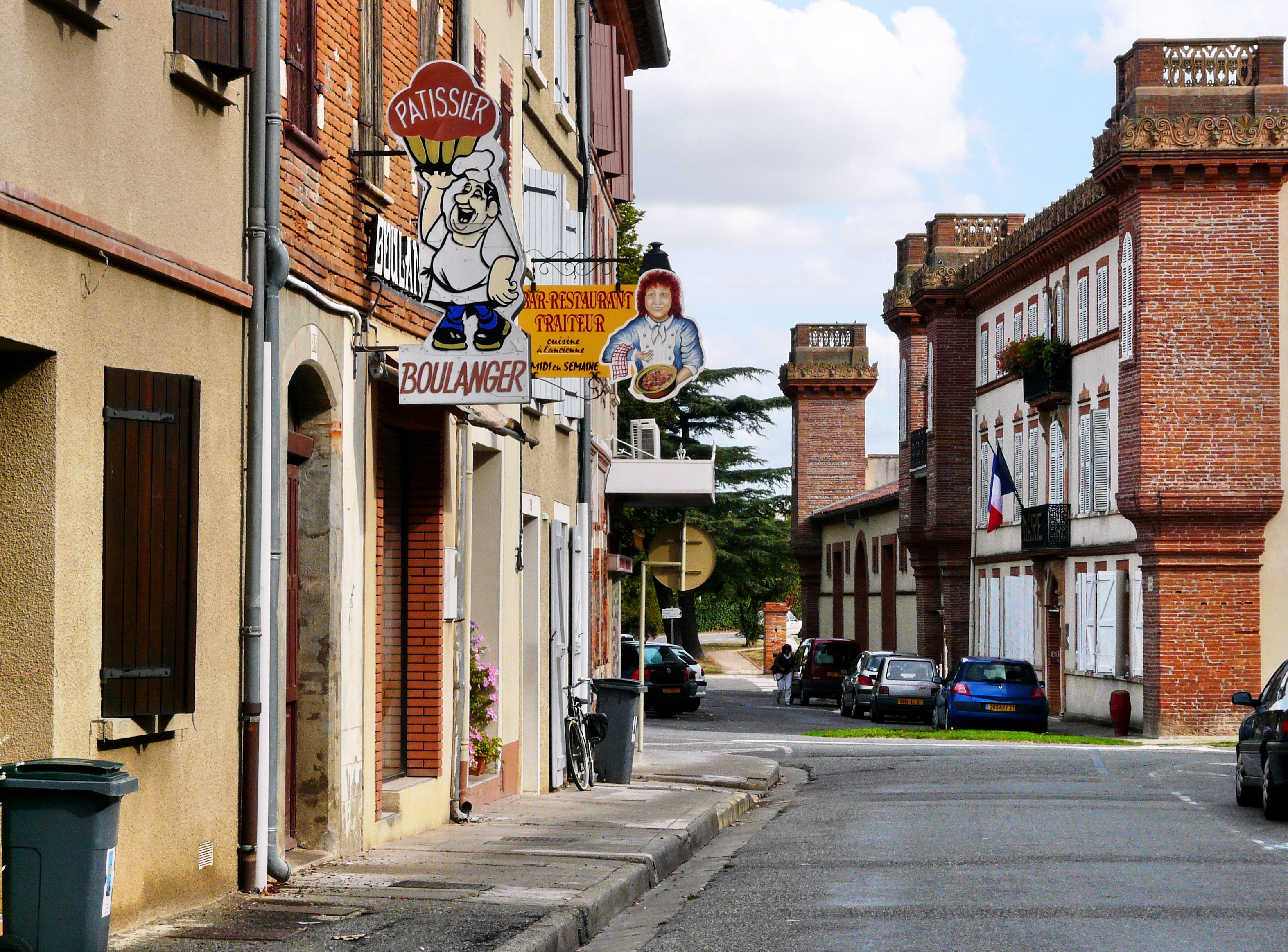 Mairie de Lavernose-Lacasse (Haute-Garonne, France).